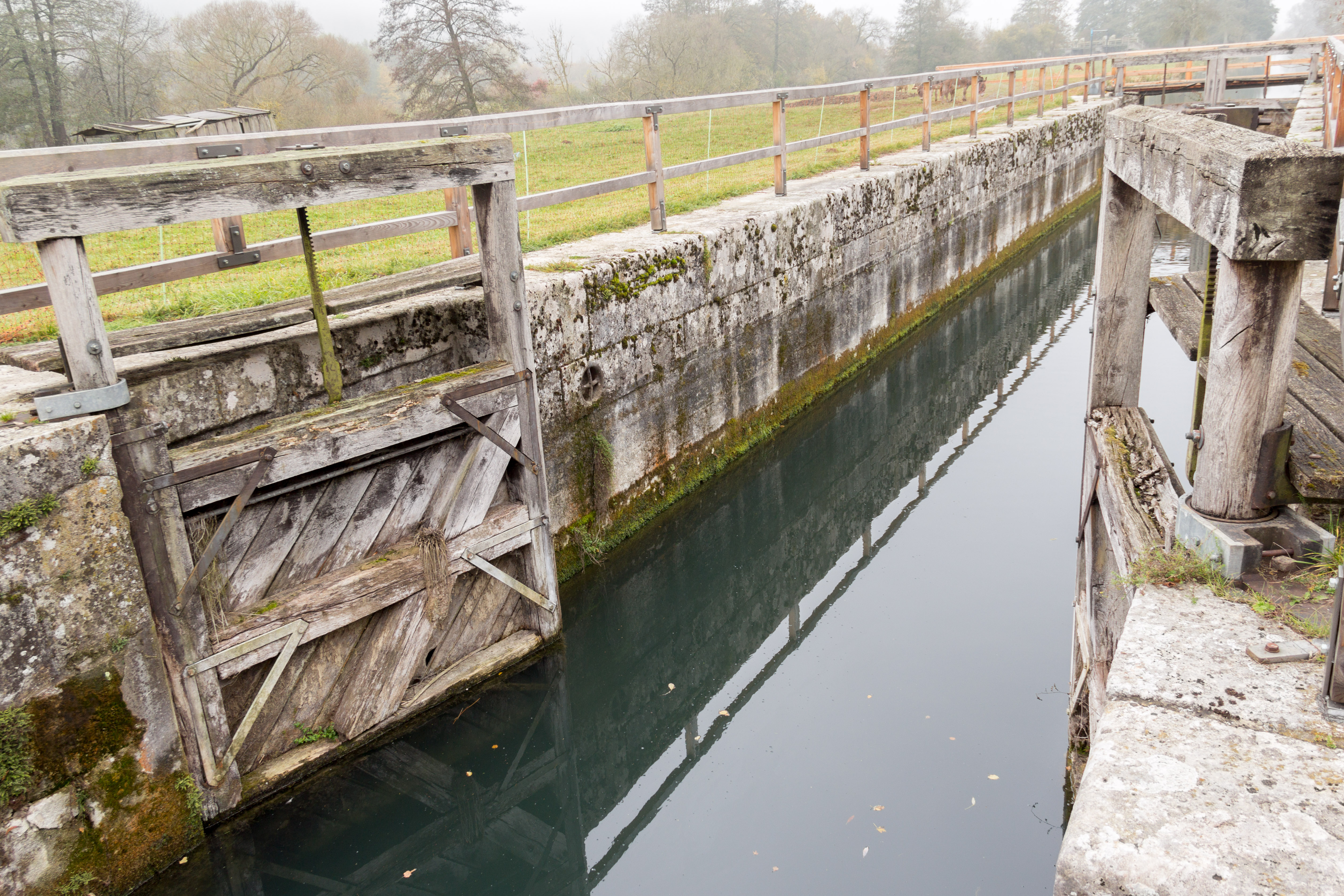 Ludwig-Donau-Main-Kanal, Schleuse 12, Schleuse, Dietfurt, Mühlbach